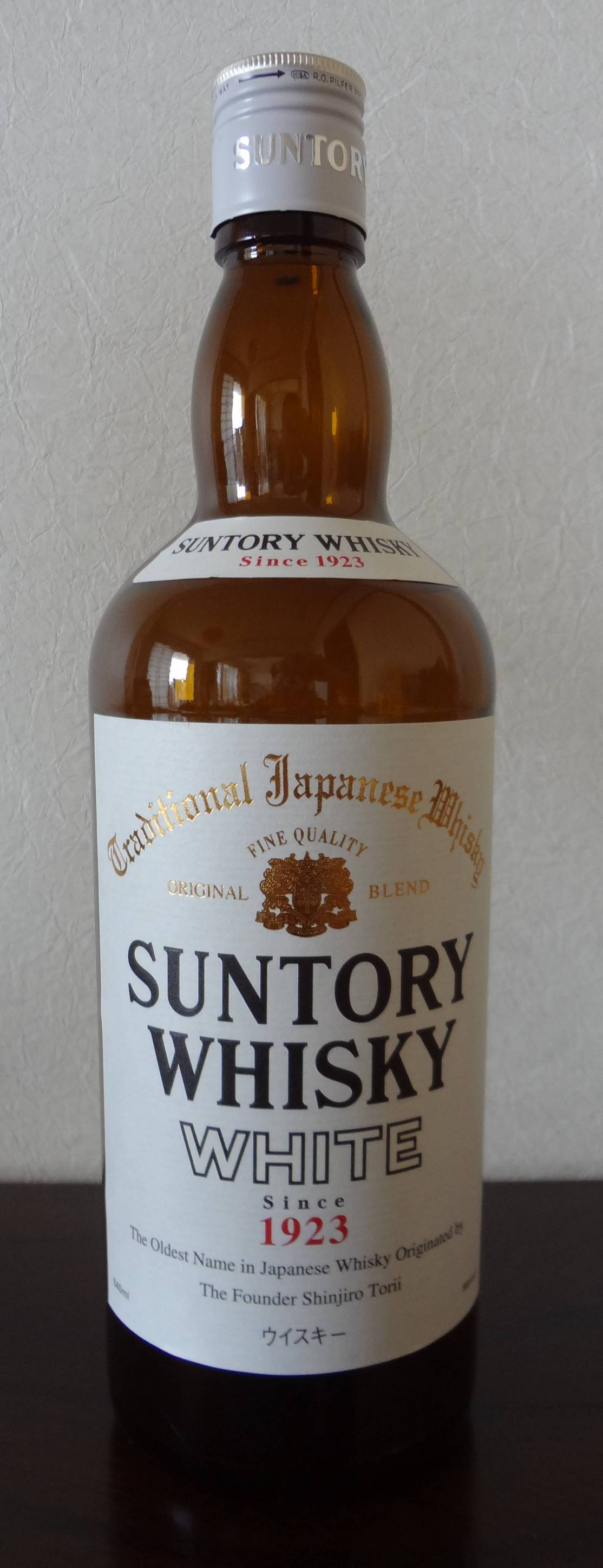 サントリーホワイトのボトル